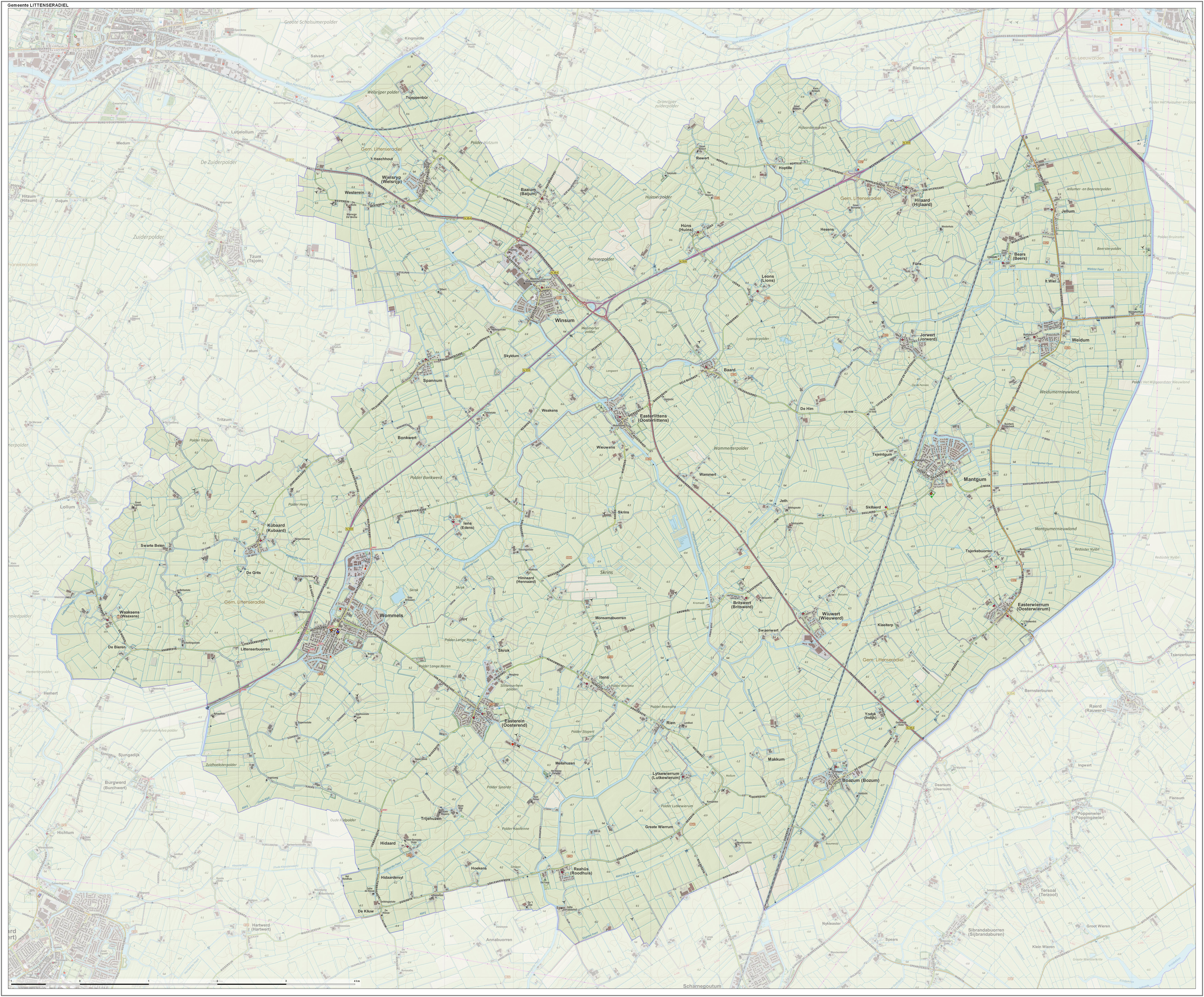 Topografische gemeentekaart. Resolutie: 400 pixels/km. Kaartbeeld samengesteld uit de open geodata van de Top10NL en Top25namen (Kadaster), Creative Commons-BY licentie. Gebouwvlakken uit open geodata BAG extract. Wegen uit de OpenStreetMap, OpenStreetMap community. Reliëfschaduw uit de Actuele Hoogtekaart AHN2. Samenstelling en kleurenschema: Jan-Willem van Aalst, met QGIS. Zie ook de Legenda.